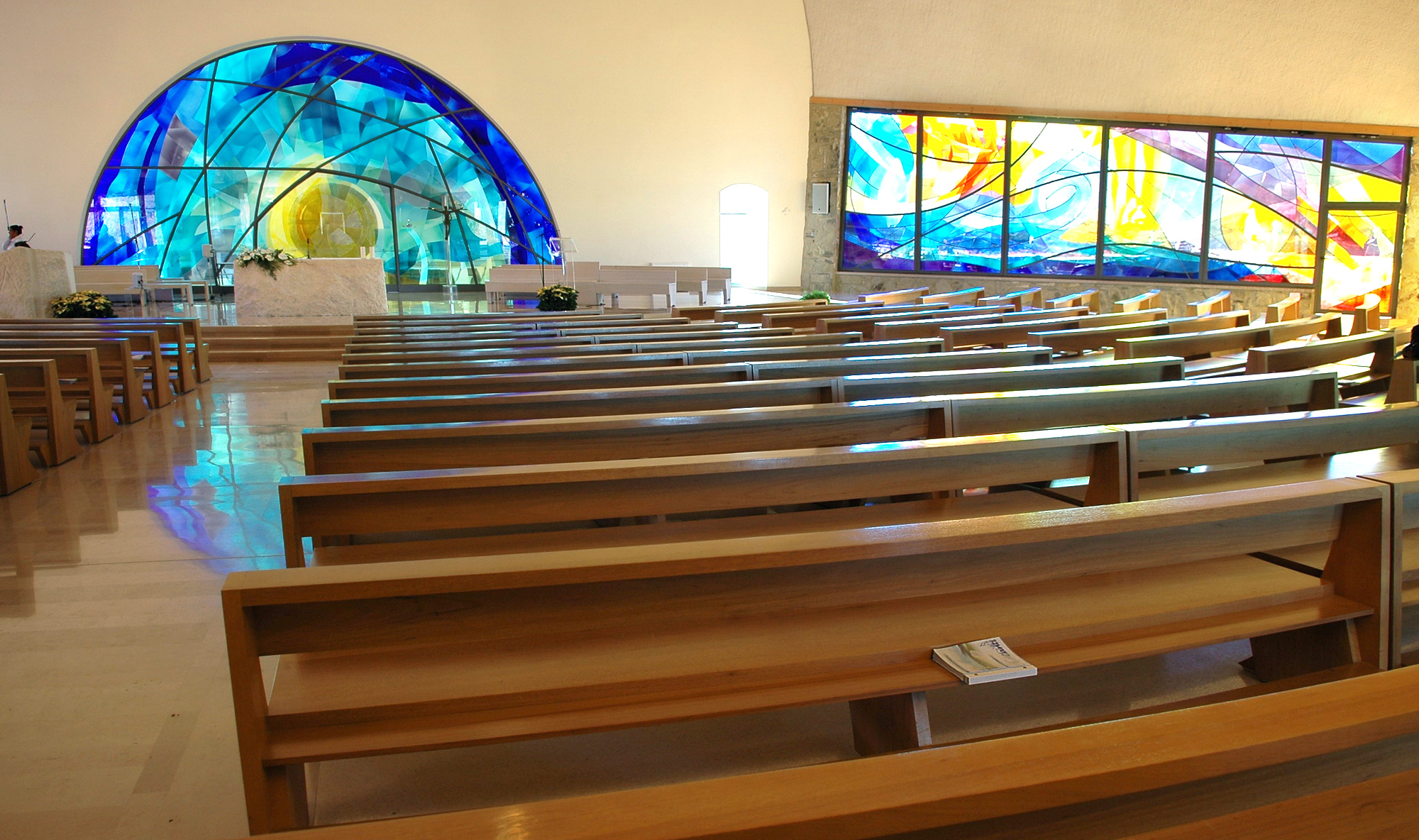 Chiesa di Loppiano